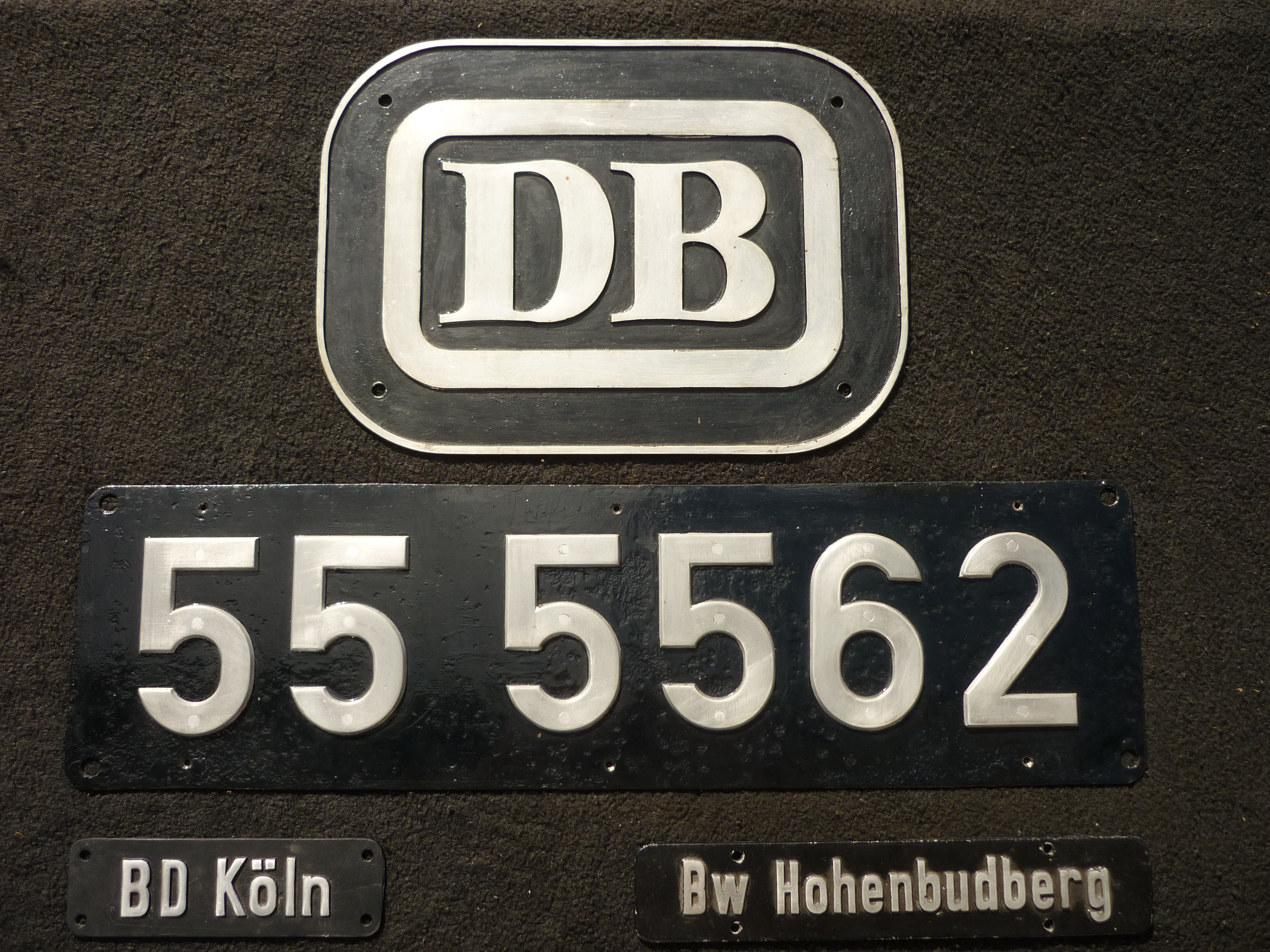 Staatsbahn (DB), Loknummernschild (Typ 55), Ordnungsnummer (5562), Bahndirektion (BD), Bahnbetriebswerk (Bw).